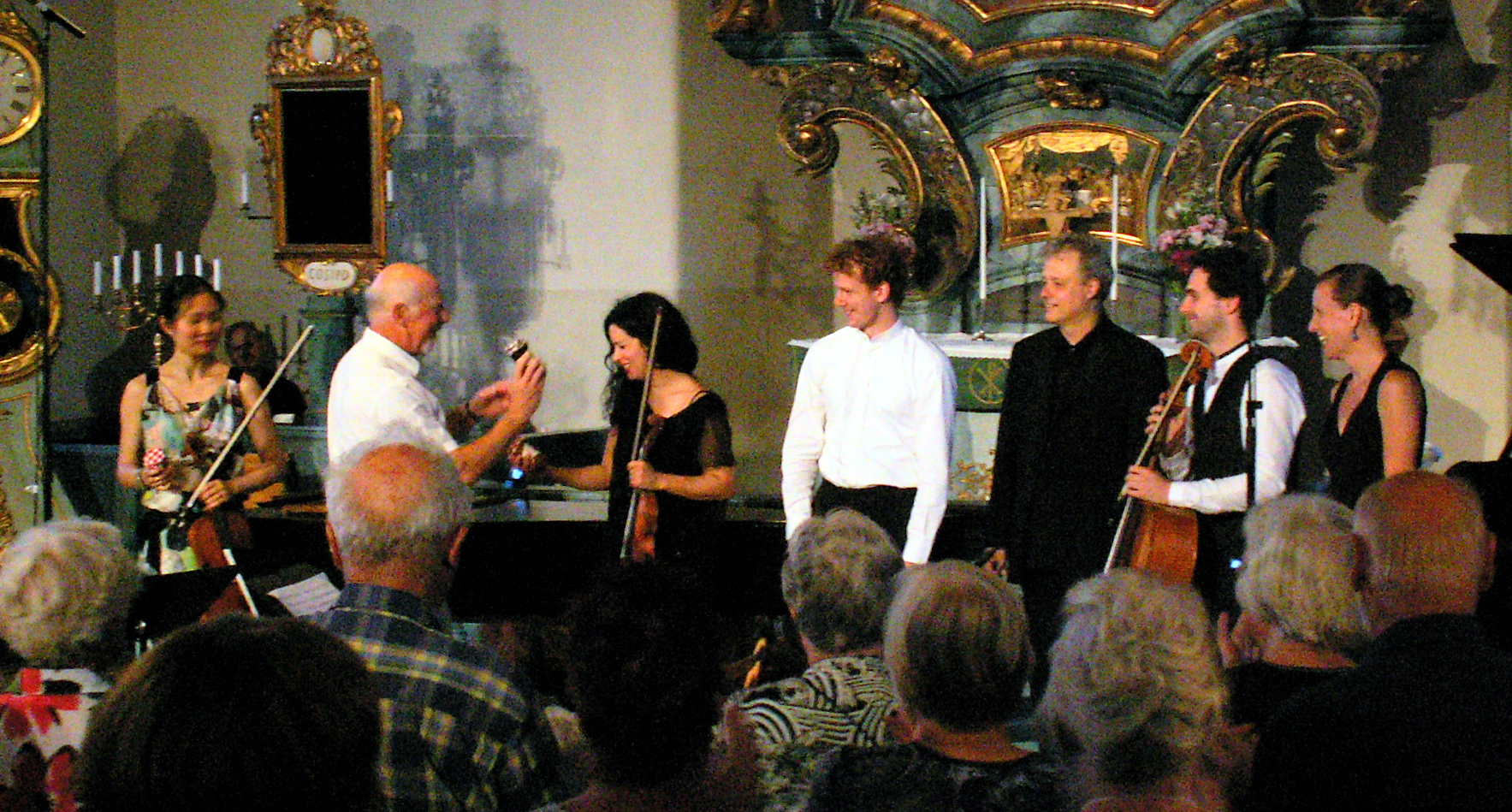 Avtackning efter konserten 29 juli 2016 i Stöde kyrka, under Stöde Musikvecka. Möjligen sker på bilden utdelning av "skogens guld" (lokal produktion). Från vänster på bilden: Peijun Xu, Stefan Groth (arrangör), Priya Mitchell, Veit Hertenstein, Lars Jönsson, Charles Antoine Duflot och Petra Marianowski.